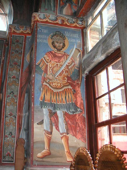 Pravoslavna ikona Miloša Obilića kao svetog ratnika, u manastiru Hilandar.